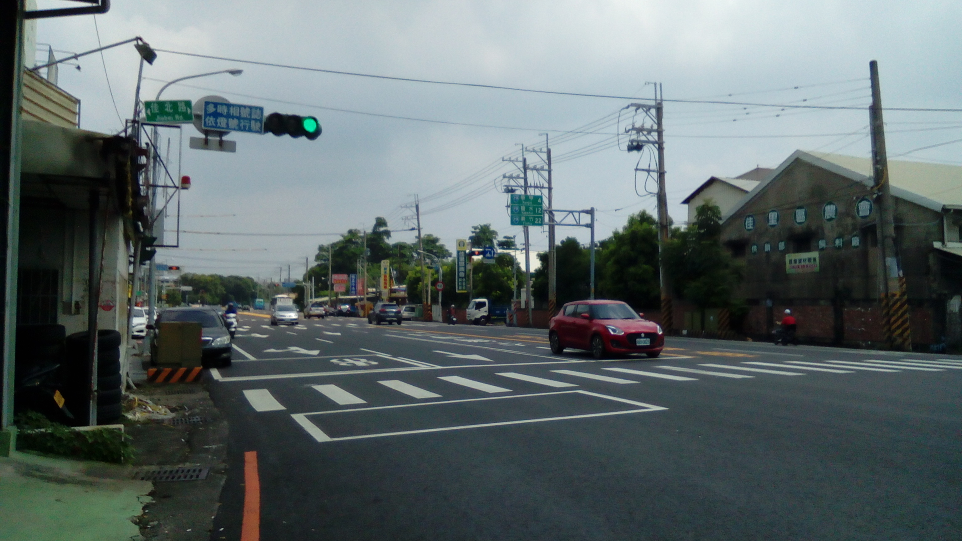 佳北路和延平路口 台19線上里程表：學甲4、鹽水12、義竹22(單位：公里)